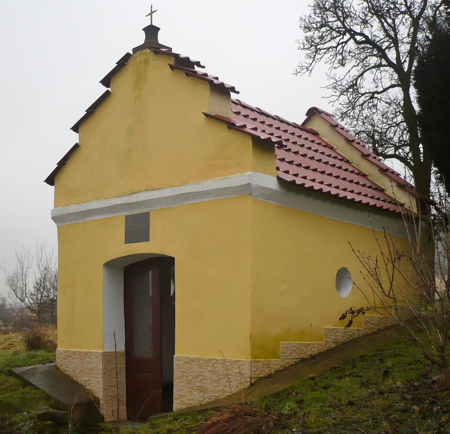 Suszyna. Kaplica